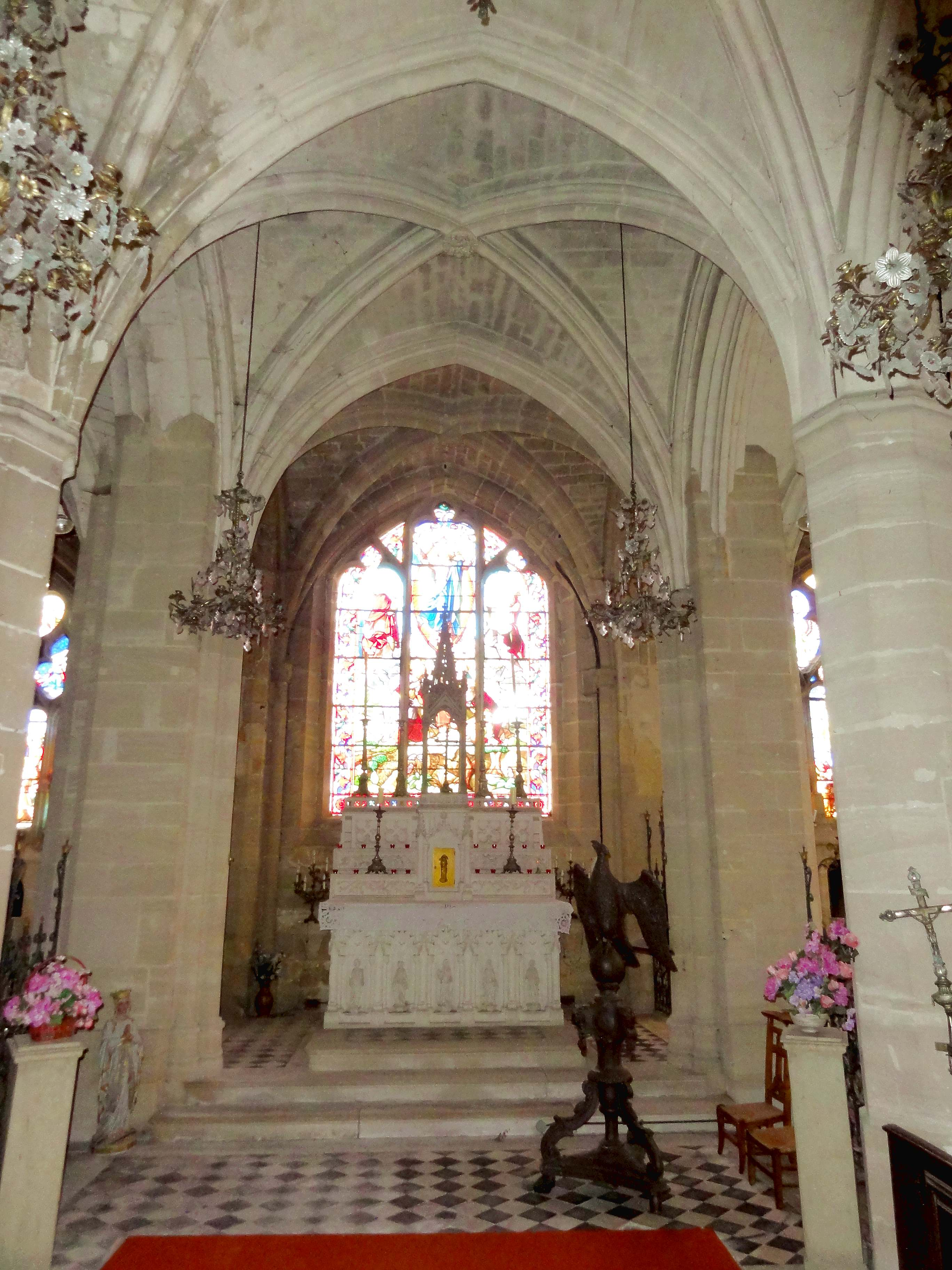 Intérieur de l'église (voir titre).